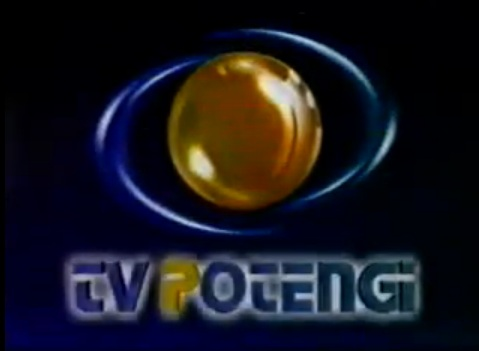 Logo da Antiga Tv Potengi, hoje Band Natal